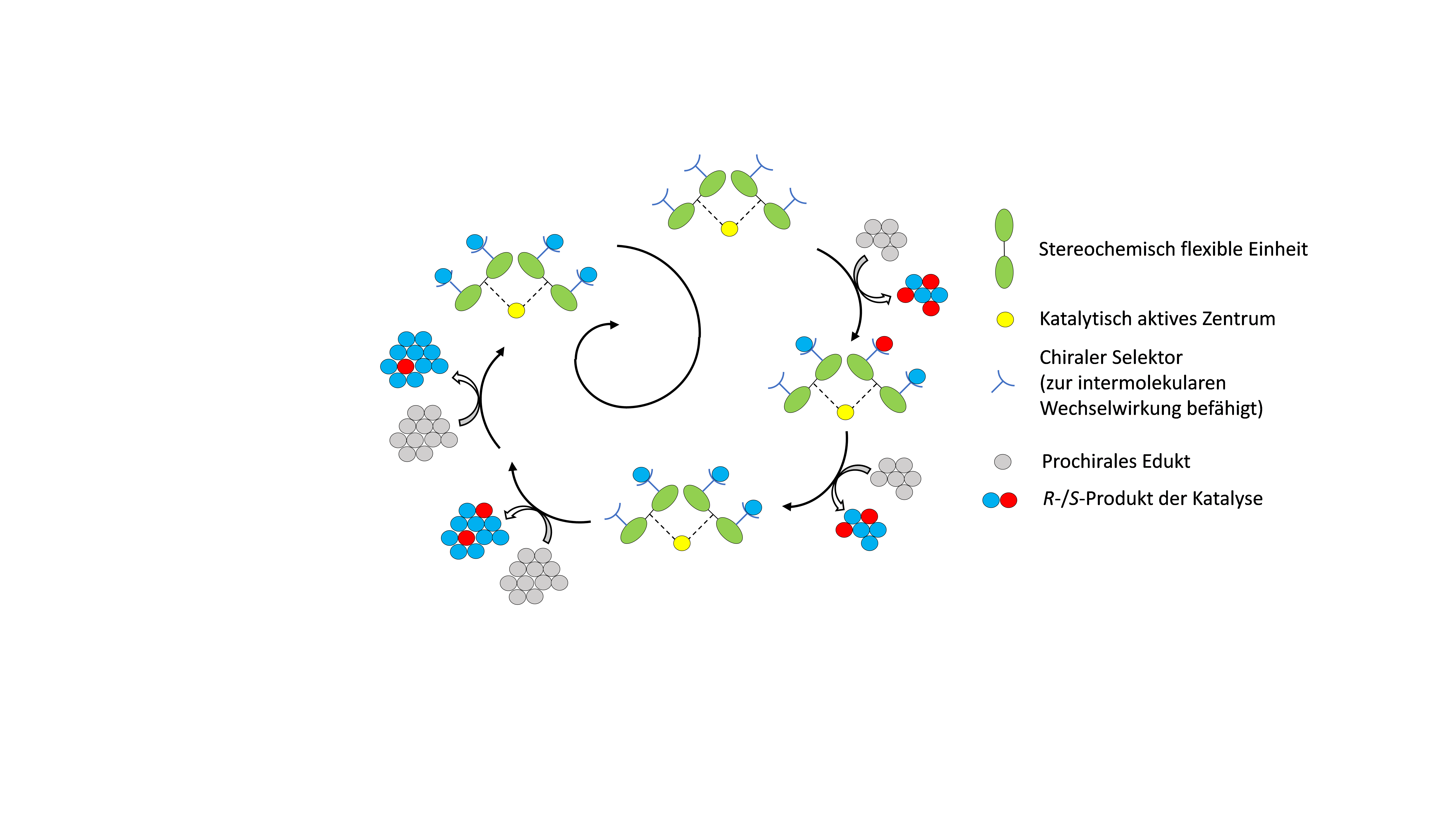 Schematische Übersicht zu den Schlüsselschritten der enantioselektiven selbstamplifizierenden Katalyse. Nach Aktivierung des Präkatalysators wird das Produkt aus dem prochiralen Edukt zunächst nur racemisch oder mit geringer Enantioselektivität gebildet. Der Katalysator interagiert über chirale Selektoreinheiten bevorzugt mit einem der beiden Produktenantiomere. Diese Wechselwirkung zwischen dem Produktenantiomer und dem stereochemisch flexiblen Katalysator induziert eine strukturelle Änderung, die auch das katalytisch aktive Zentrum beeinflusst. Diese Strukturänderung bewirkt, dass das Produkt in den nachfolgenden Katalysezyklen mit höherer Enantioselektivität gebildet wird.